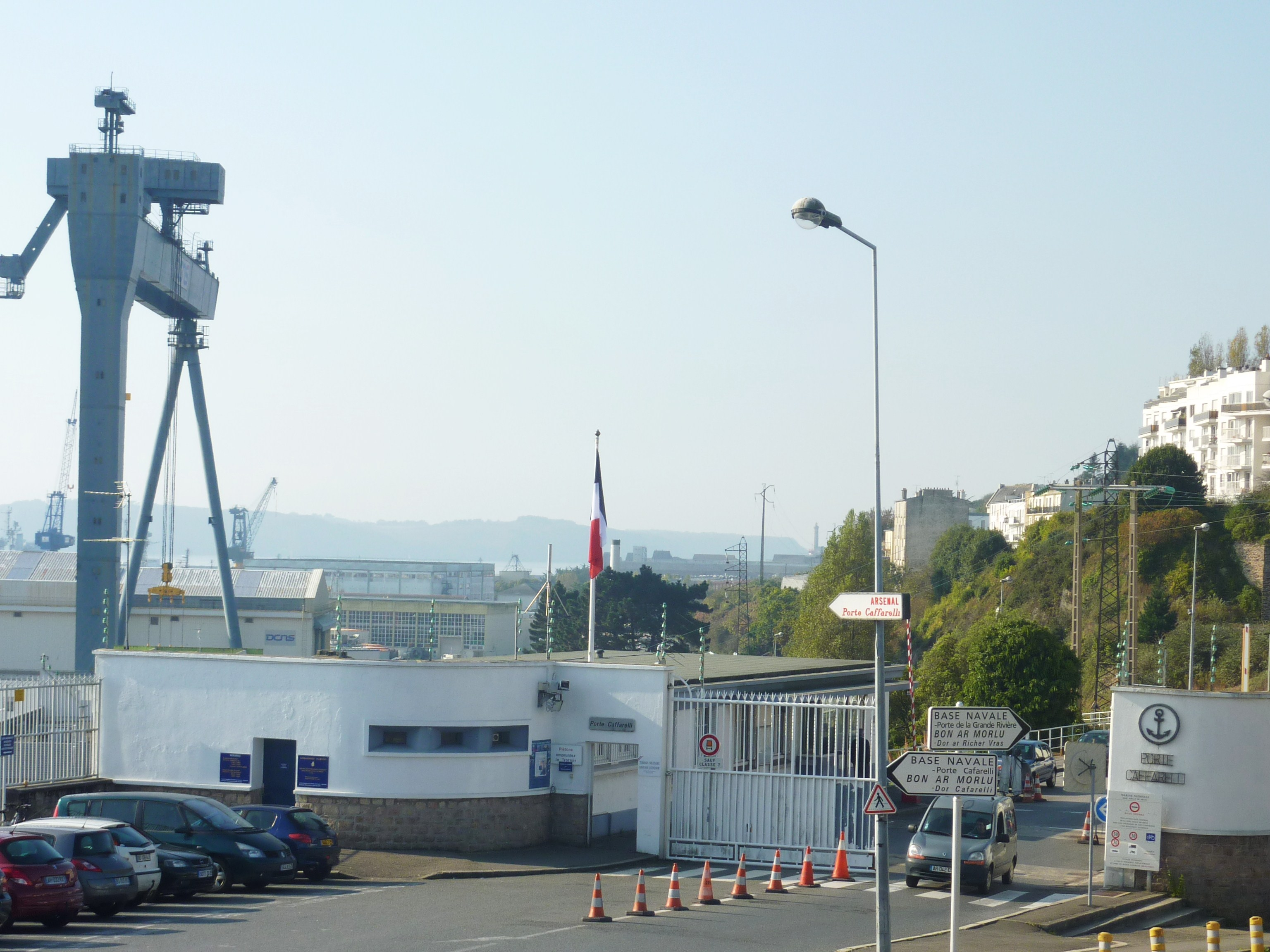 Brest Recouvrance : la porte Caffarelli (une des portes d'entrée de l'Arsenal) et la route de la Corniche)